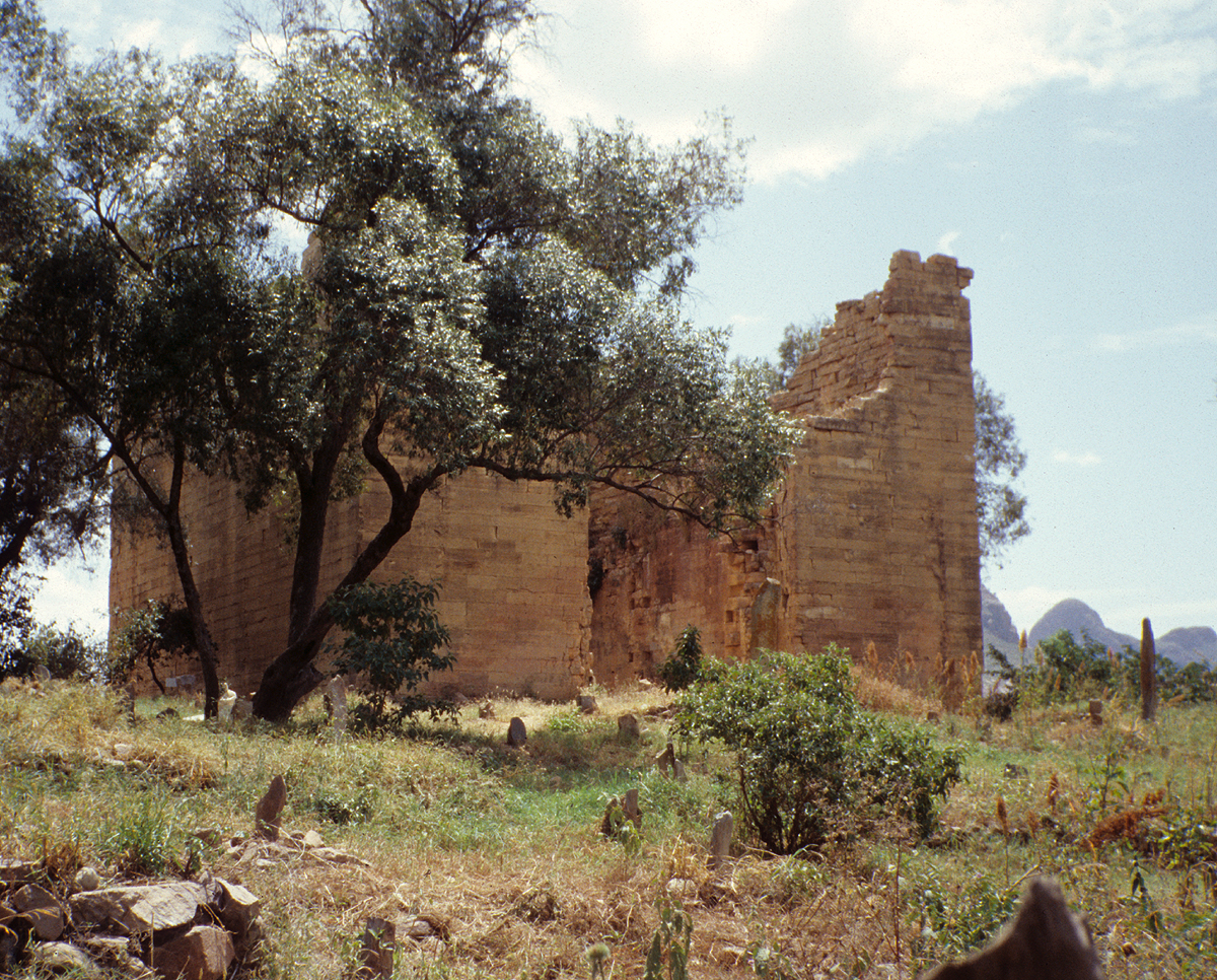 Tempel von Yeha in Tigray, Vorderseite